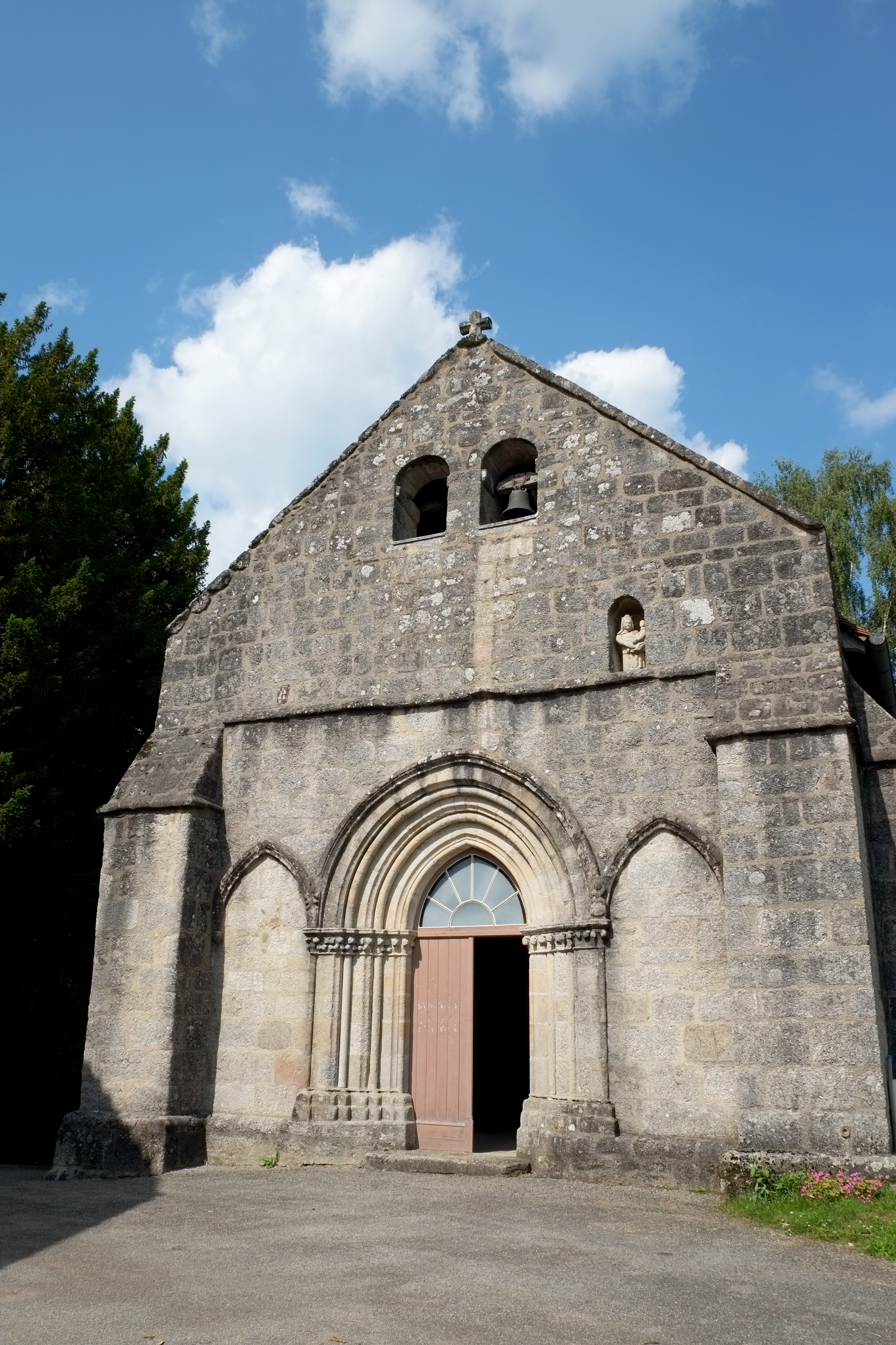 Kirche Nativité-de la-Vierge in Cheissoux im Département Haute-Vienne in der Region Limousin (Frankreich)